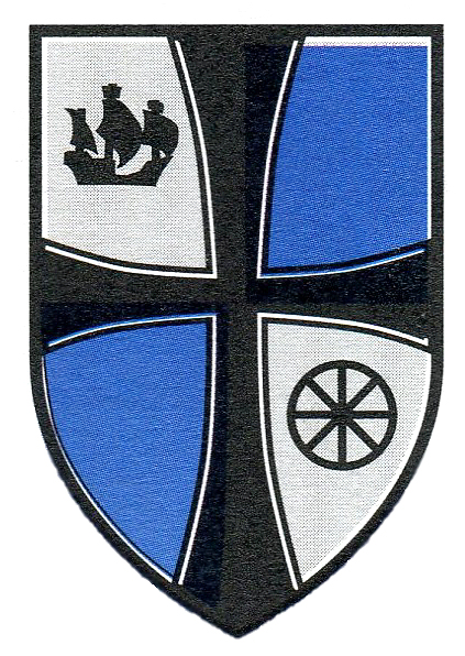 Verbandsabzeichen der Truppendienststelle See der Bundeswehr